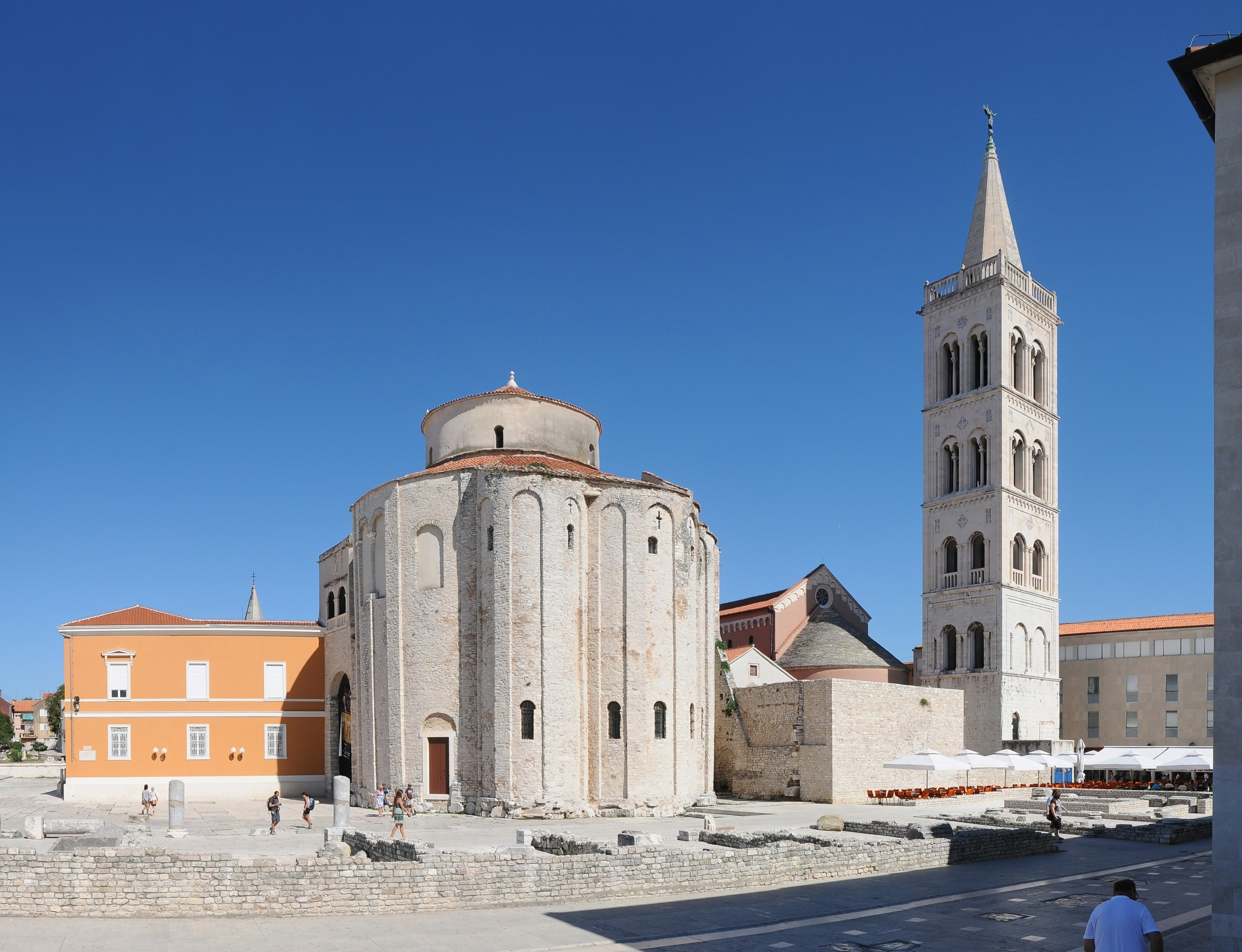 links Kirche Sv. Donat, rechts: Kirchturm der Kathedrale der Hl. Anastasia in Zadar .